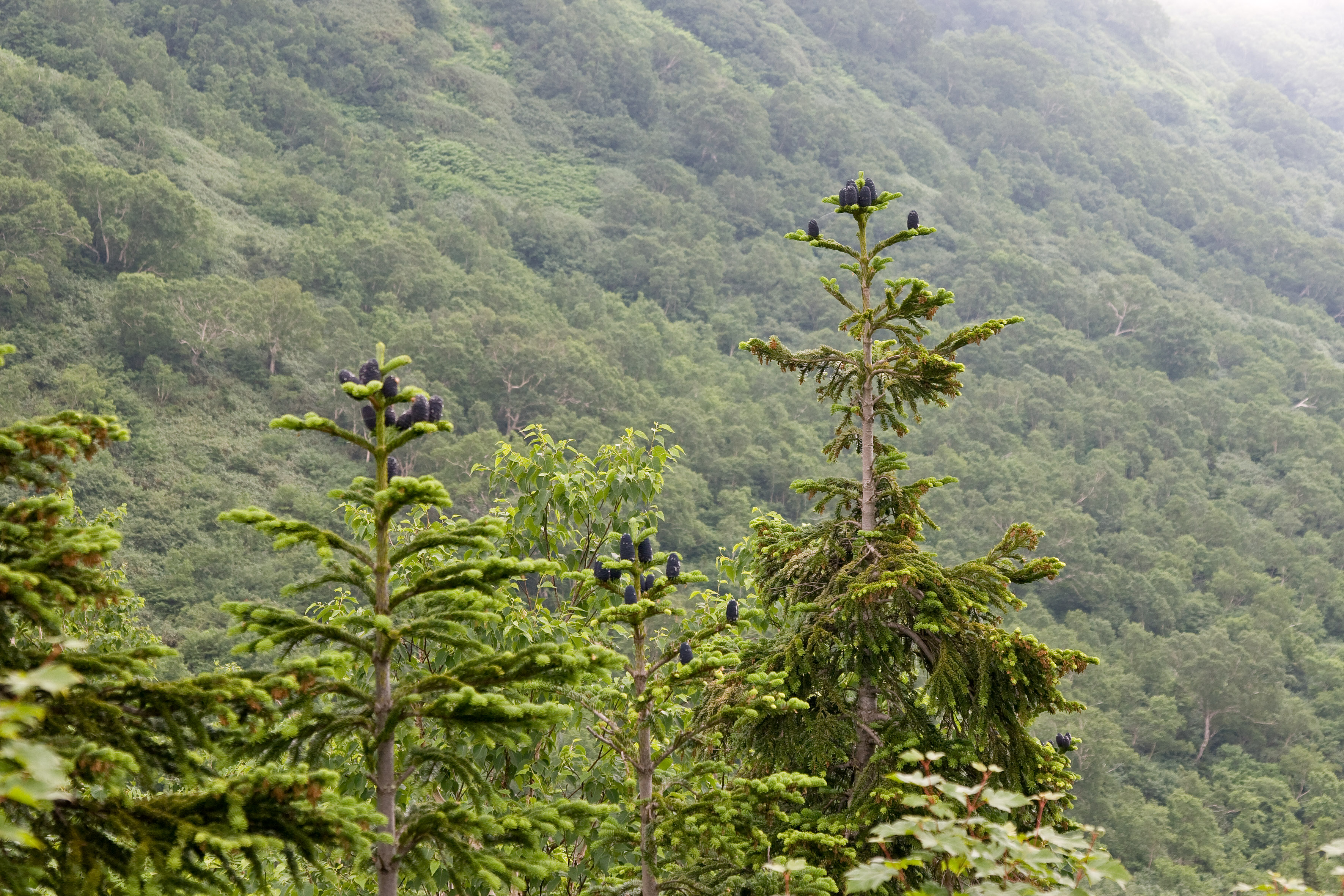 オオシラビソ (学名:Abies mariesii)